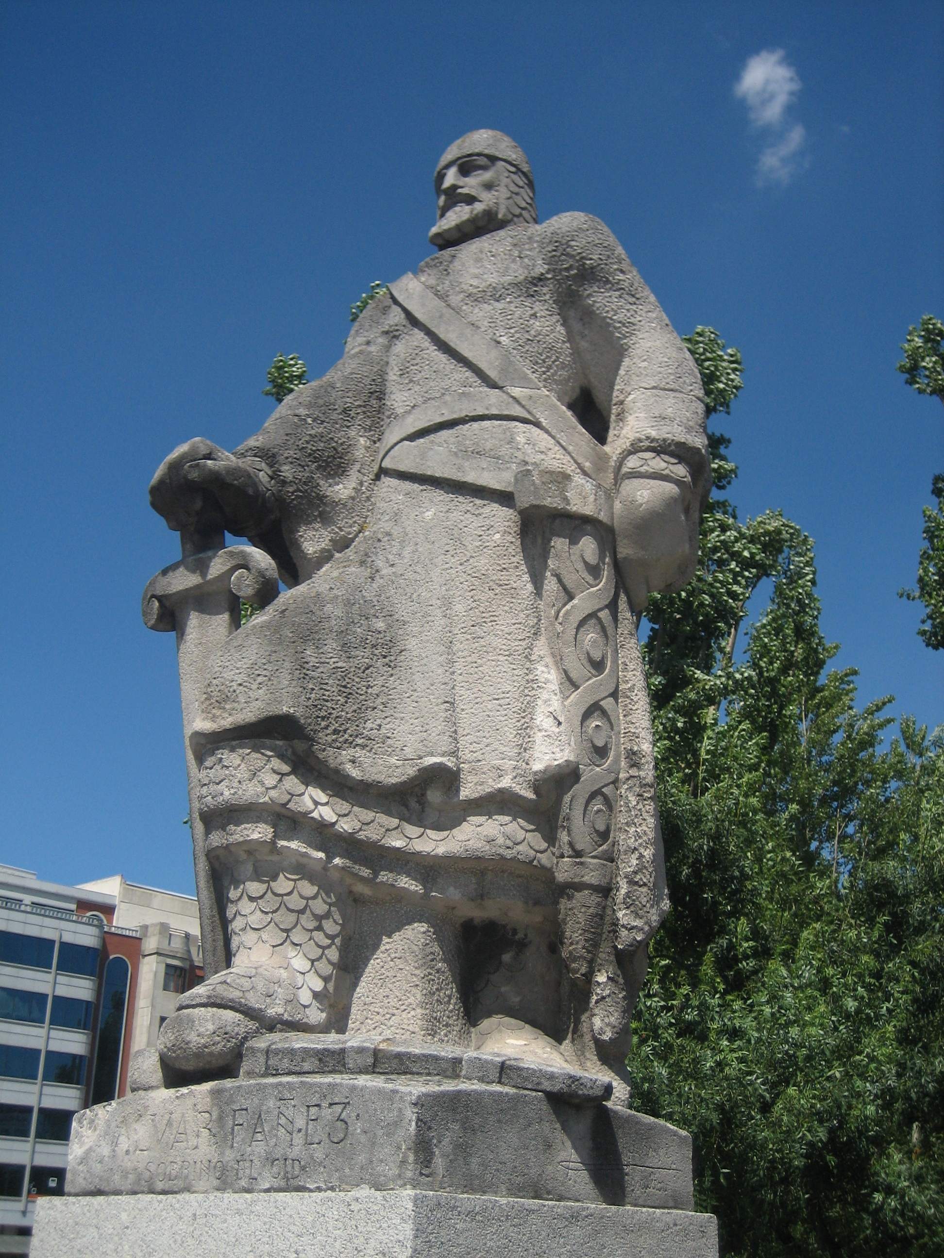 Estatua de Álvar Fáñez, obra de Joaquín Lucarini